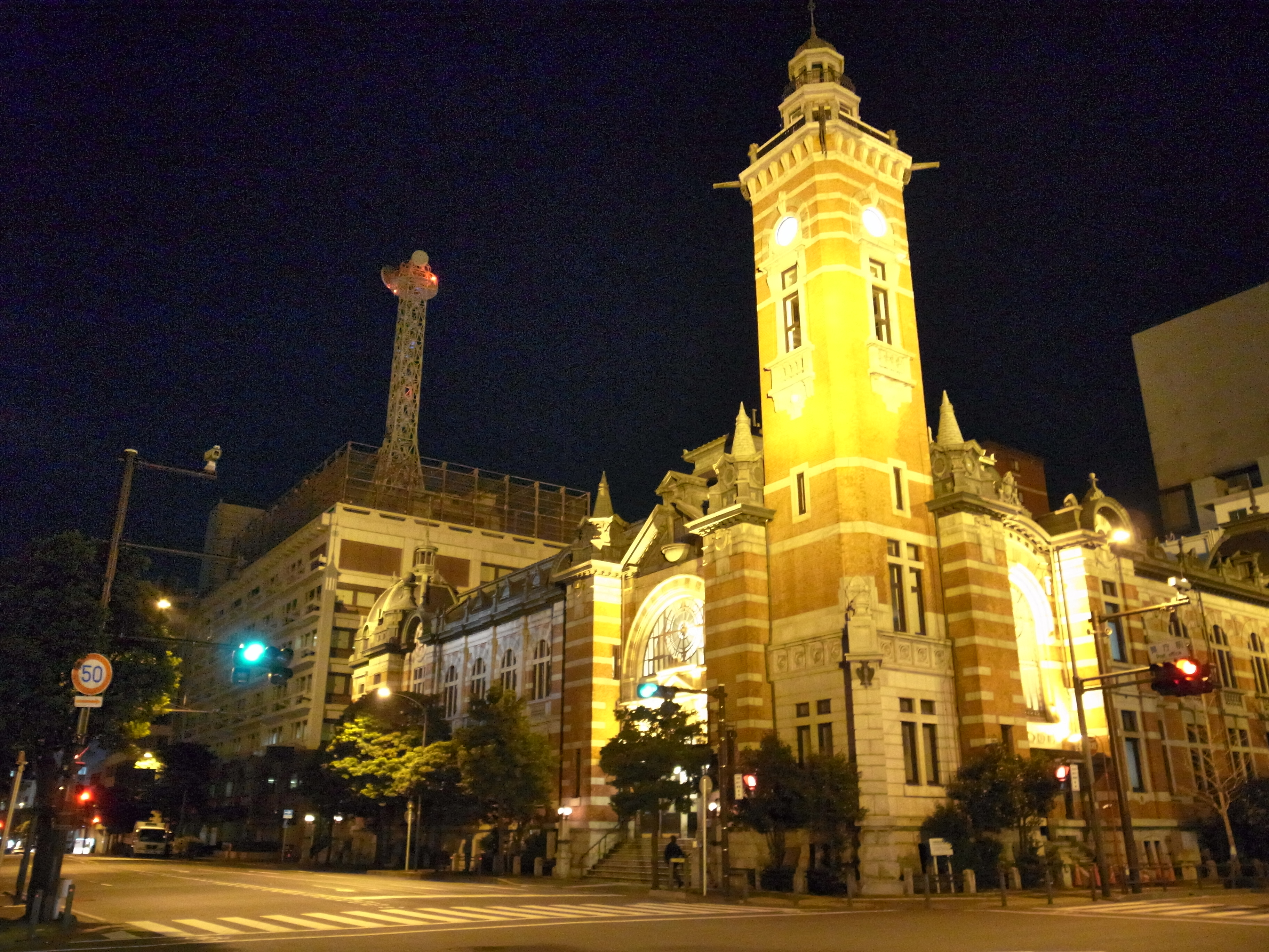 R0012298